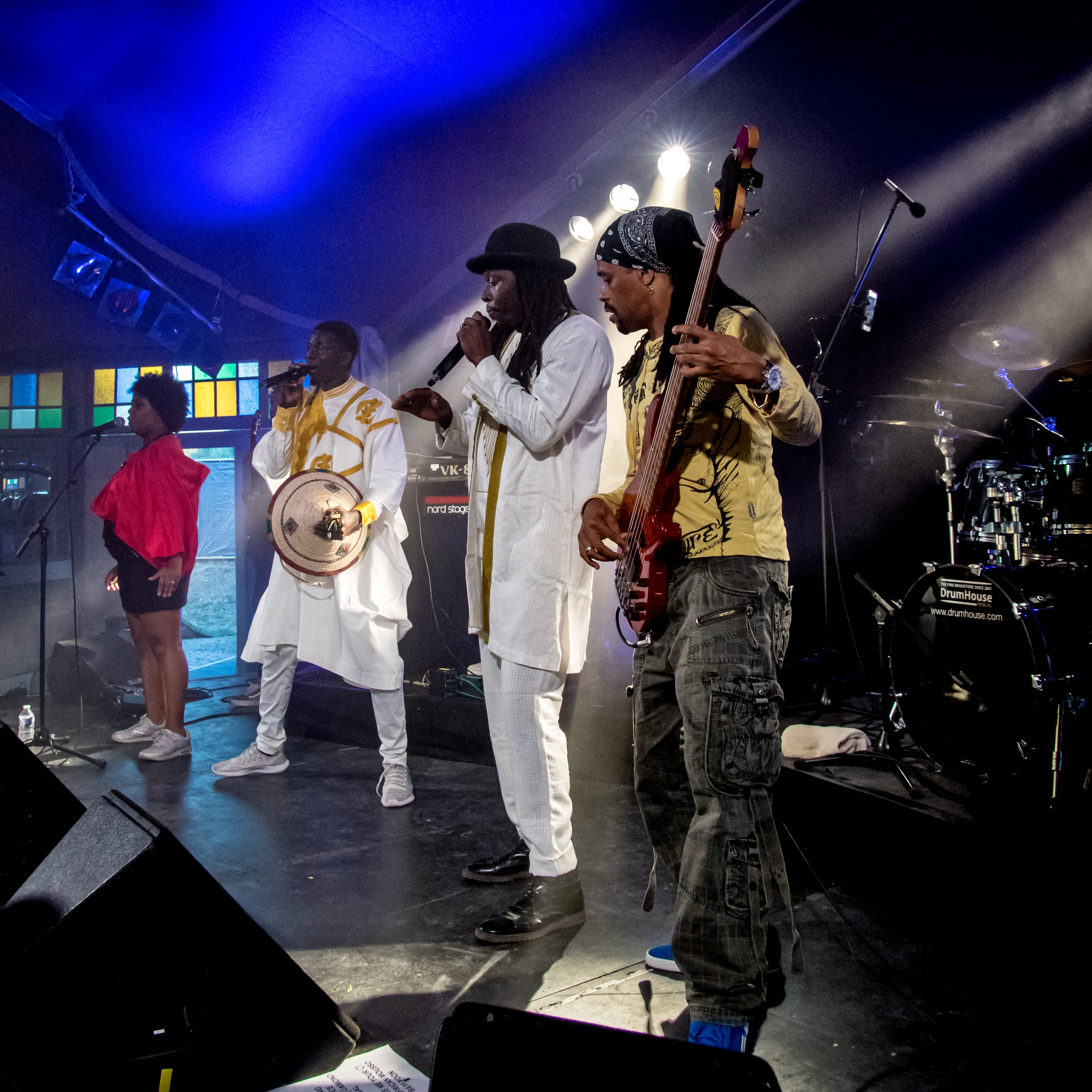 Bilder vom Zelt Musik Festival 2018 in Freiburg im Breisgau Daara J am 29.07.2018 im Spiegelzelt